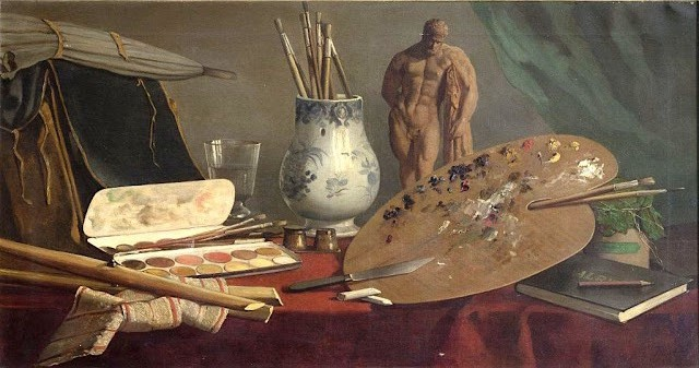 Gabriel Fayet (1832-1899) Nature morte à la palette, 1880 Musée Fayet